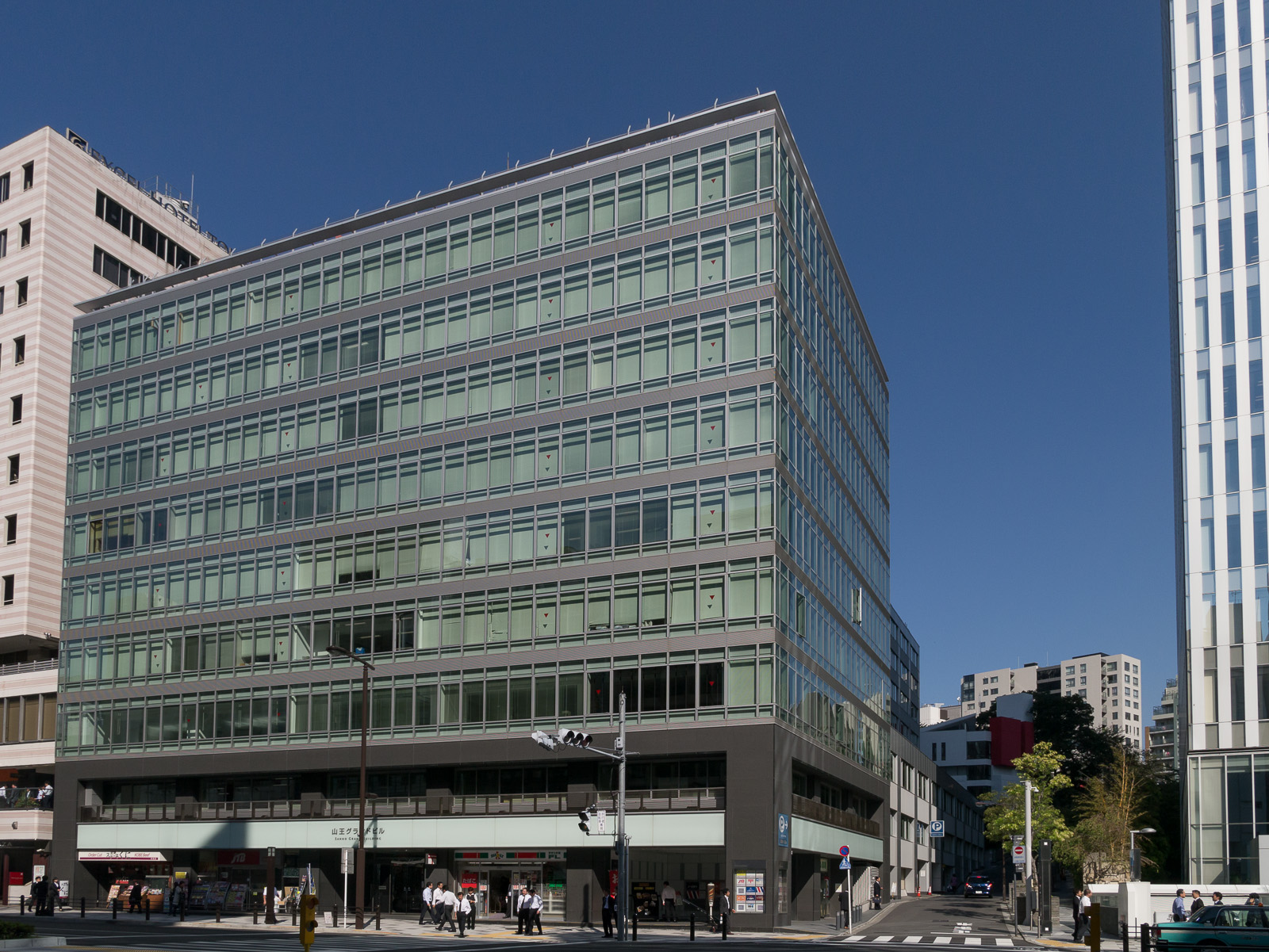 山王グランドビル、東京都千代田区永田町。